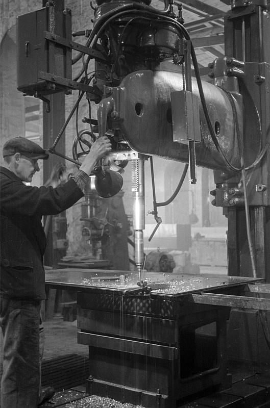 Original image description from the Deutsche FotothekDie ersten Lehrlinge